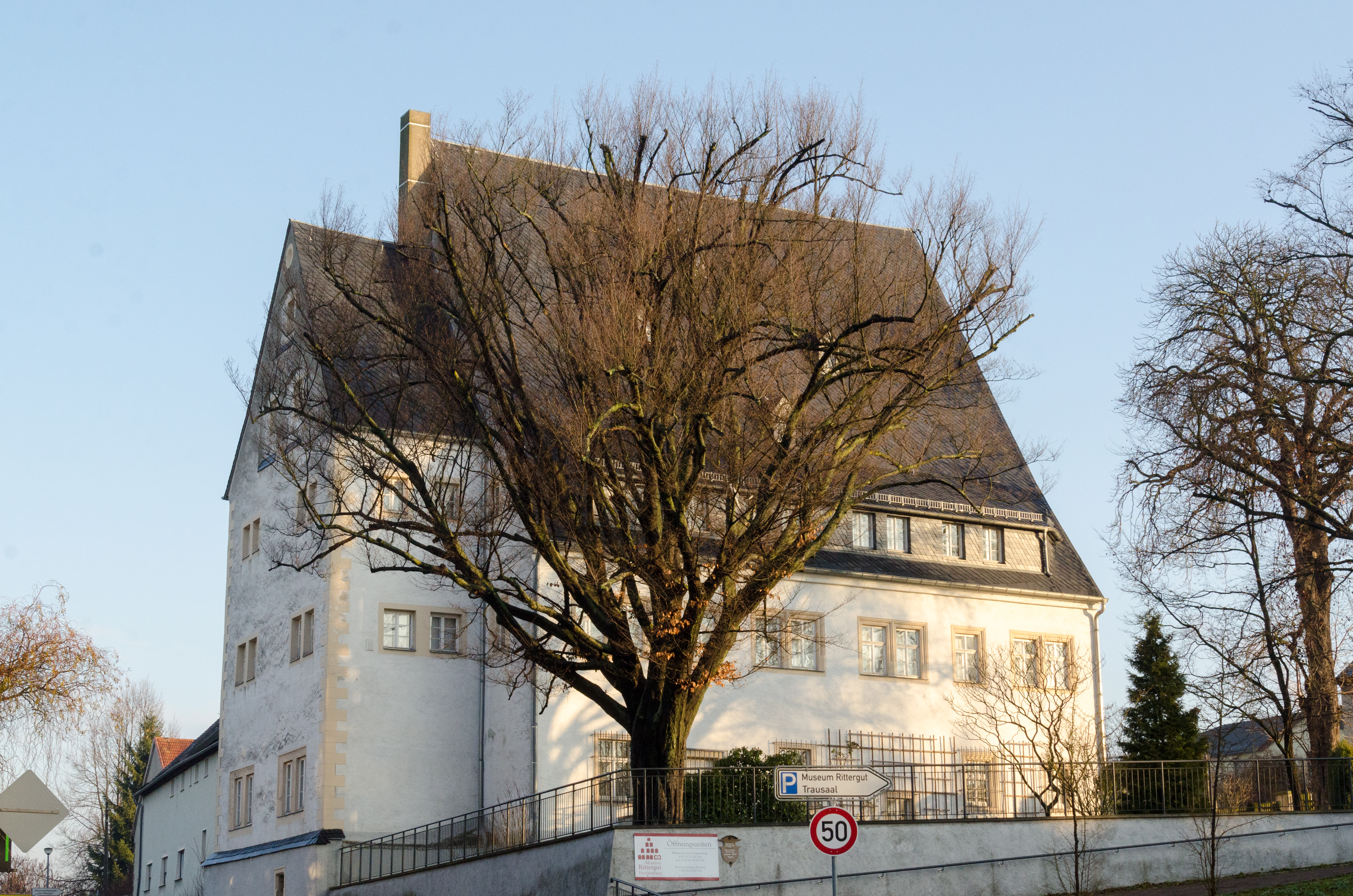 Frankenberg, Hainichener Straße 7